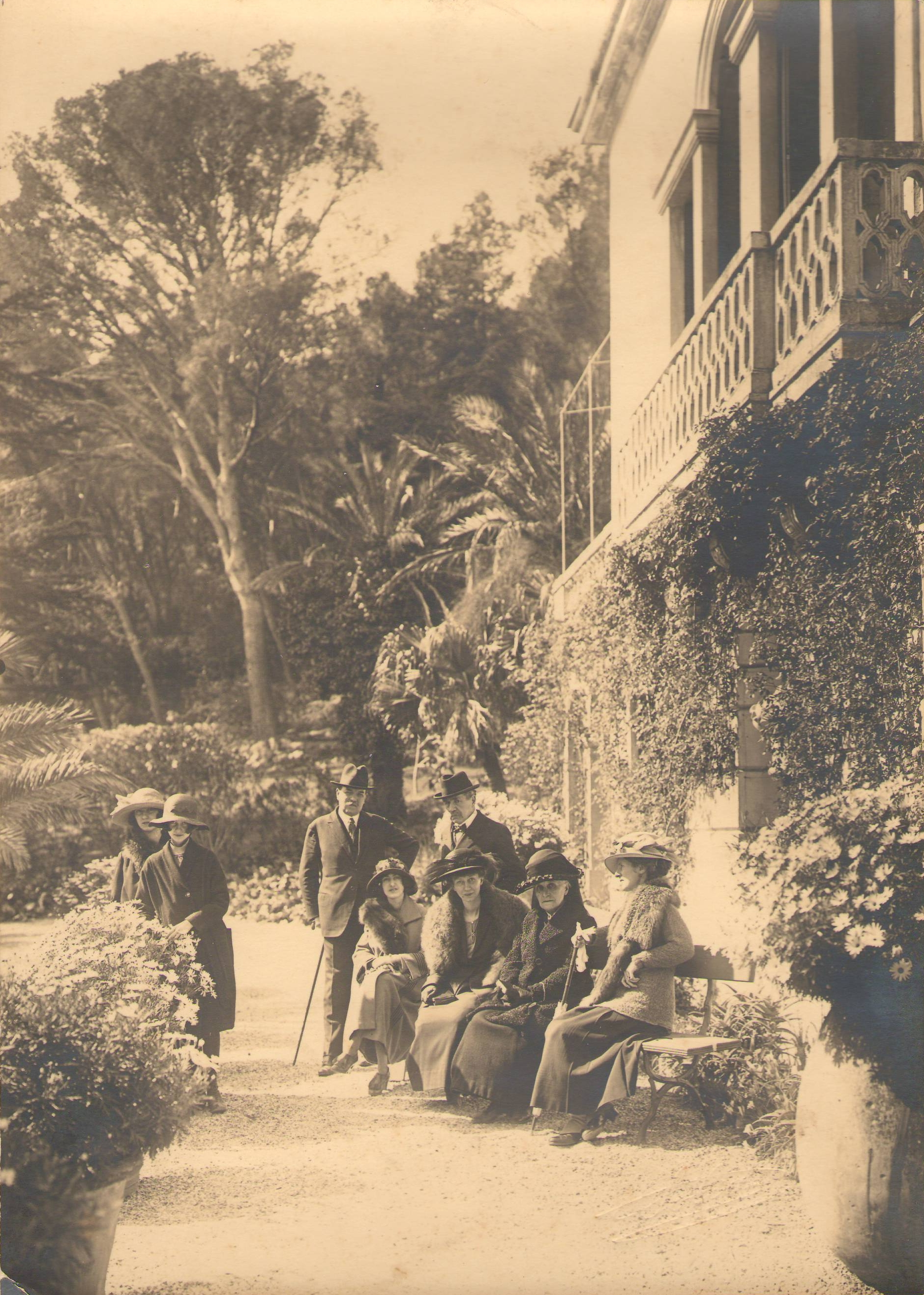 le plantier